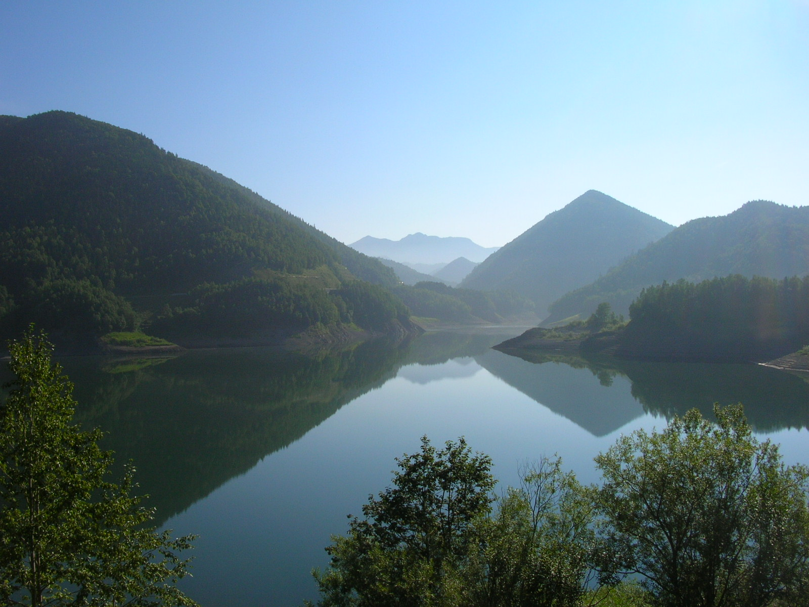 大雪湖（Lake of Daisets）